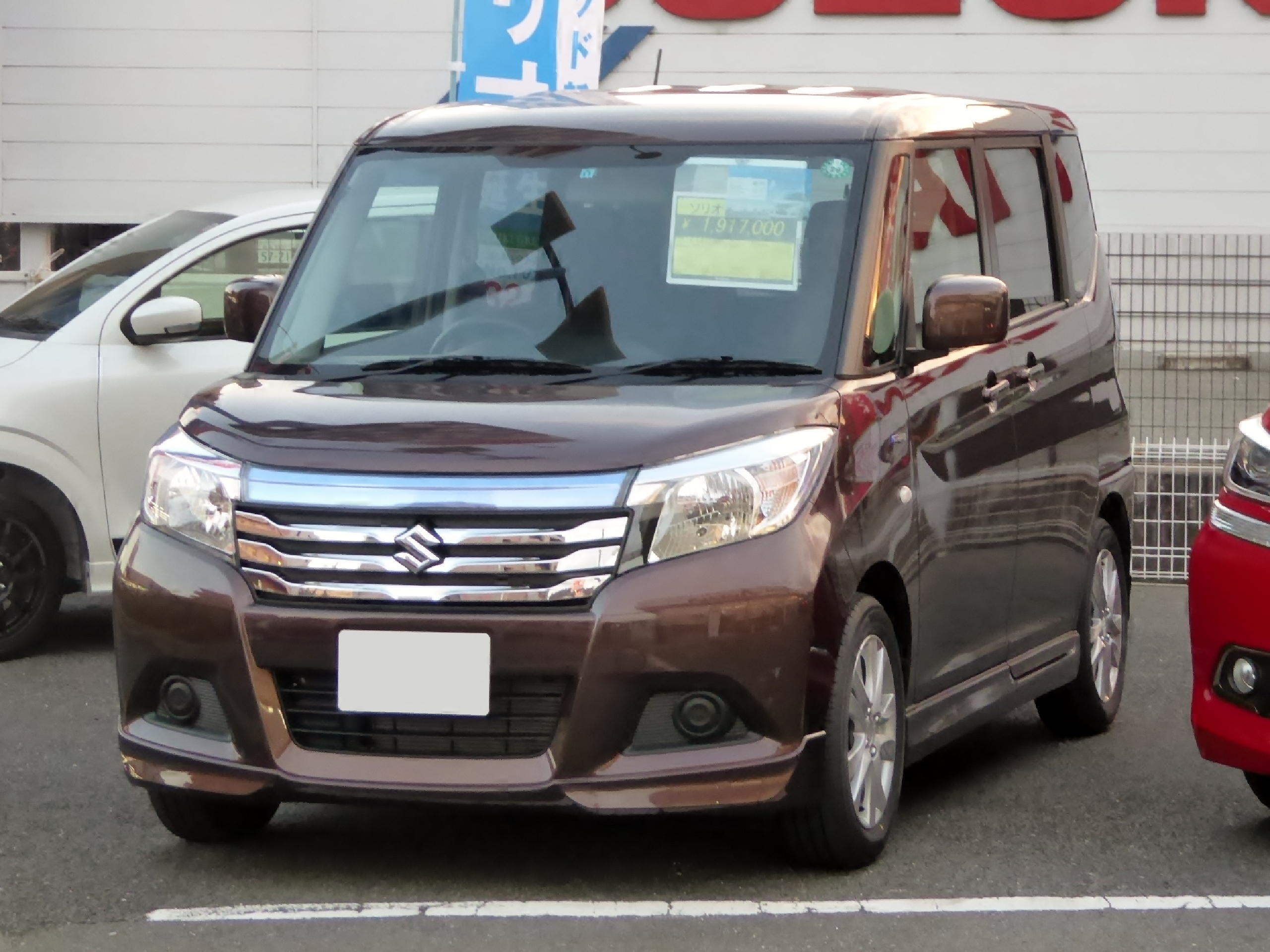 DAA-MA46S型スズキ・ソリオHYBIRD SXをフロントから撮影。